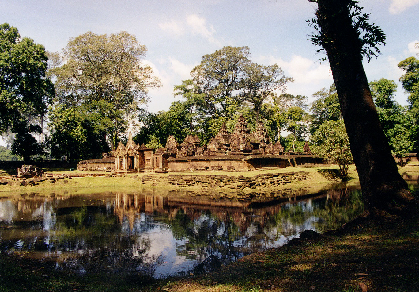 Banteay Srei in Angkor, Cambodia